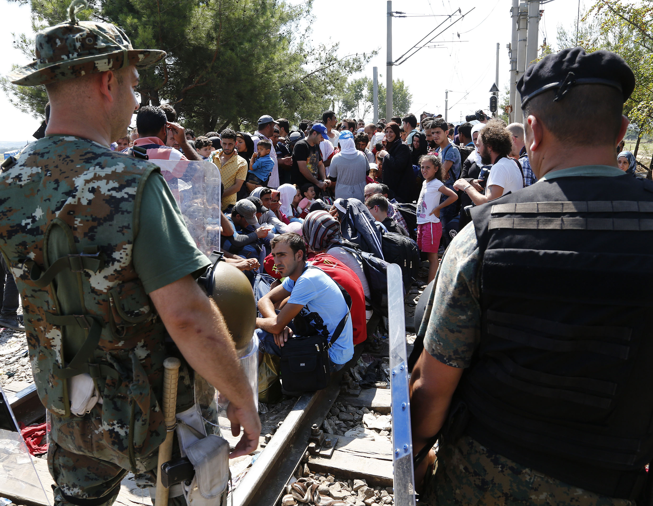 Arbeitsbesuch von Bundesminister Sebastian Kurz in Mazedonien. Besuch der Flüchtlingsströme am Grenzübergang Gevgelija. Mazedonien, 24.08.2015, Foto: Dragan Tatic